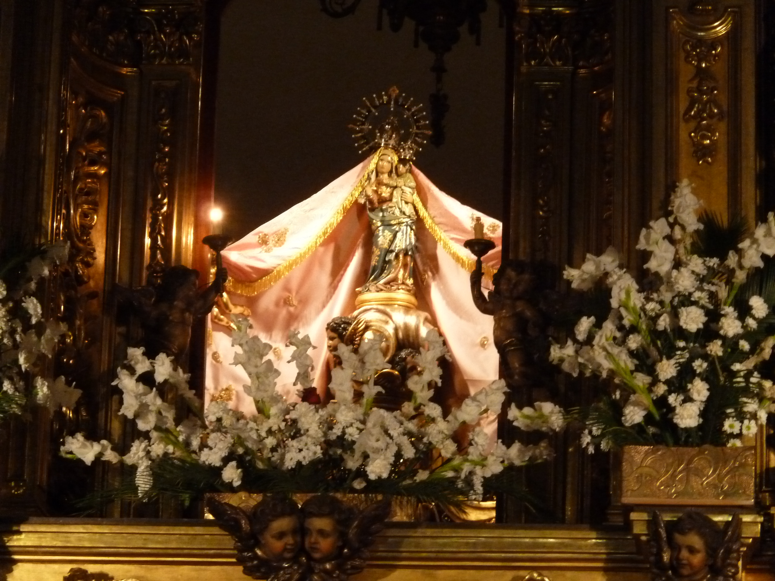 Reus